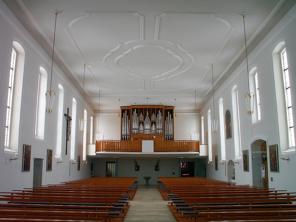 Blick auf die Orgelempore von St. Kolumban in Schwenningen (Heuberg)